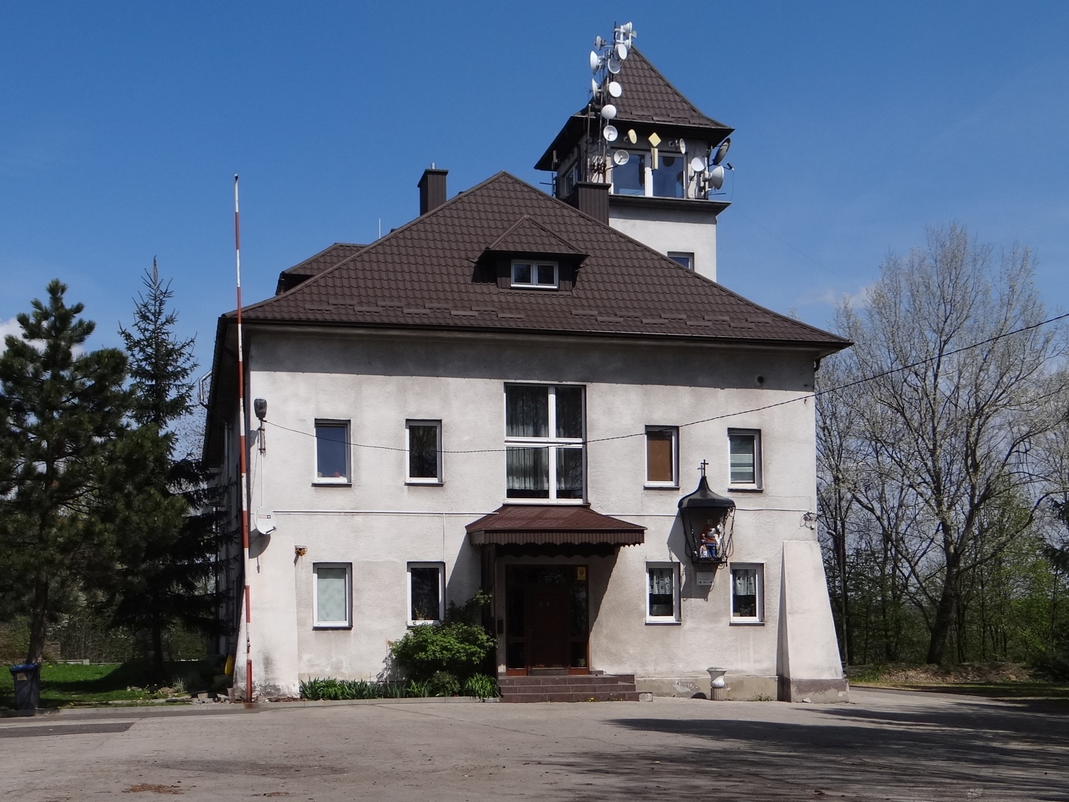 Willa w Miekini